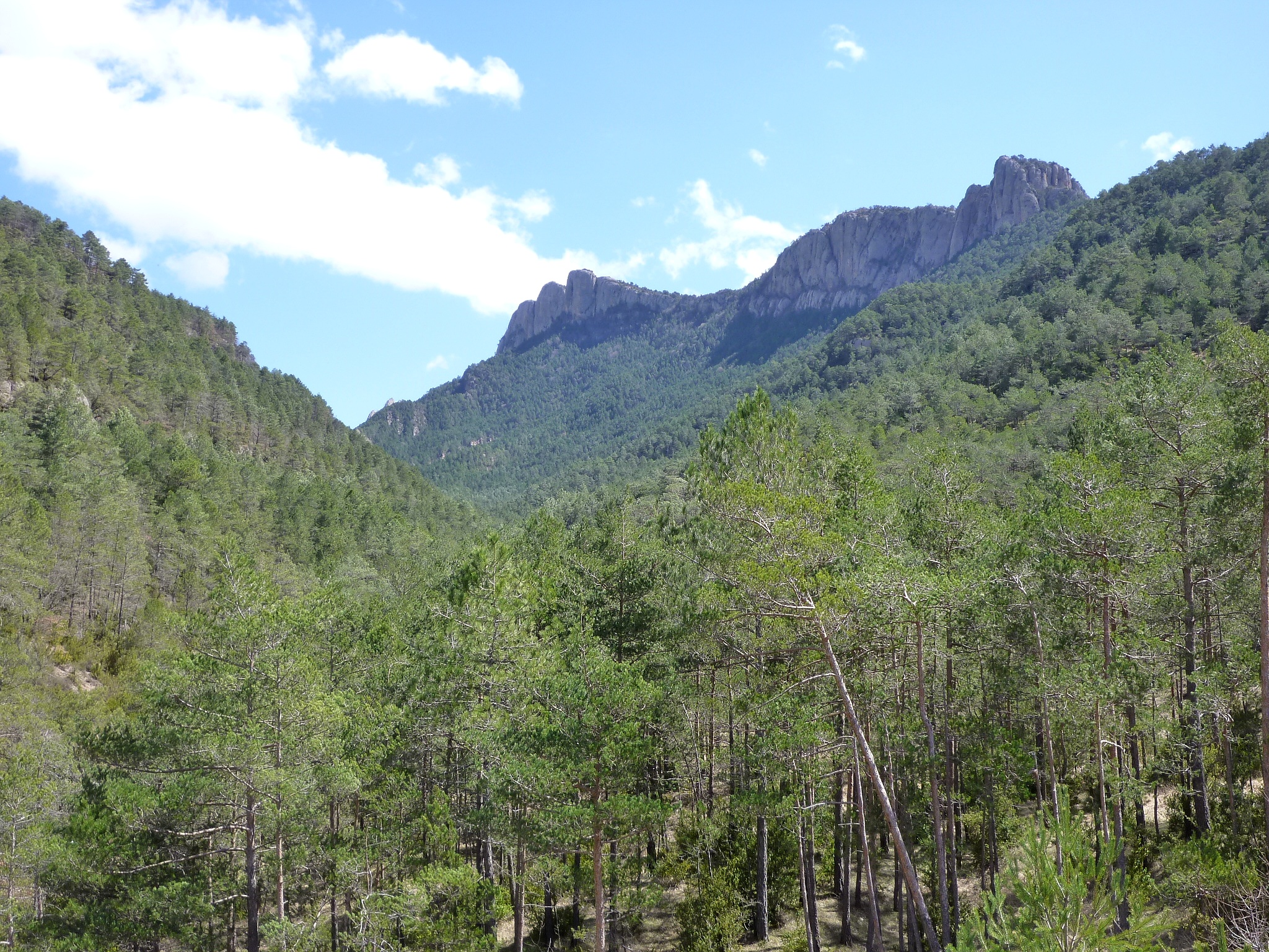 La vall de les Set Riberetes vist des de prop de la seva desembocadura, a la Serra dels Bastets, Guixers (Solsonès - Catalunya)